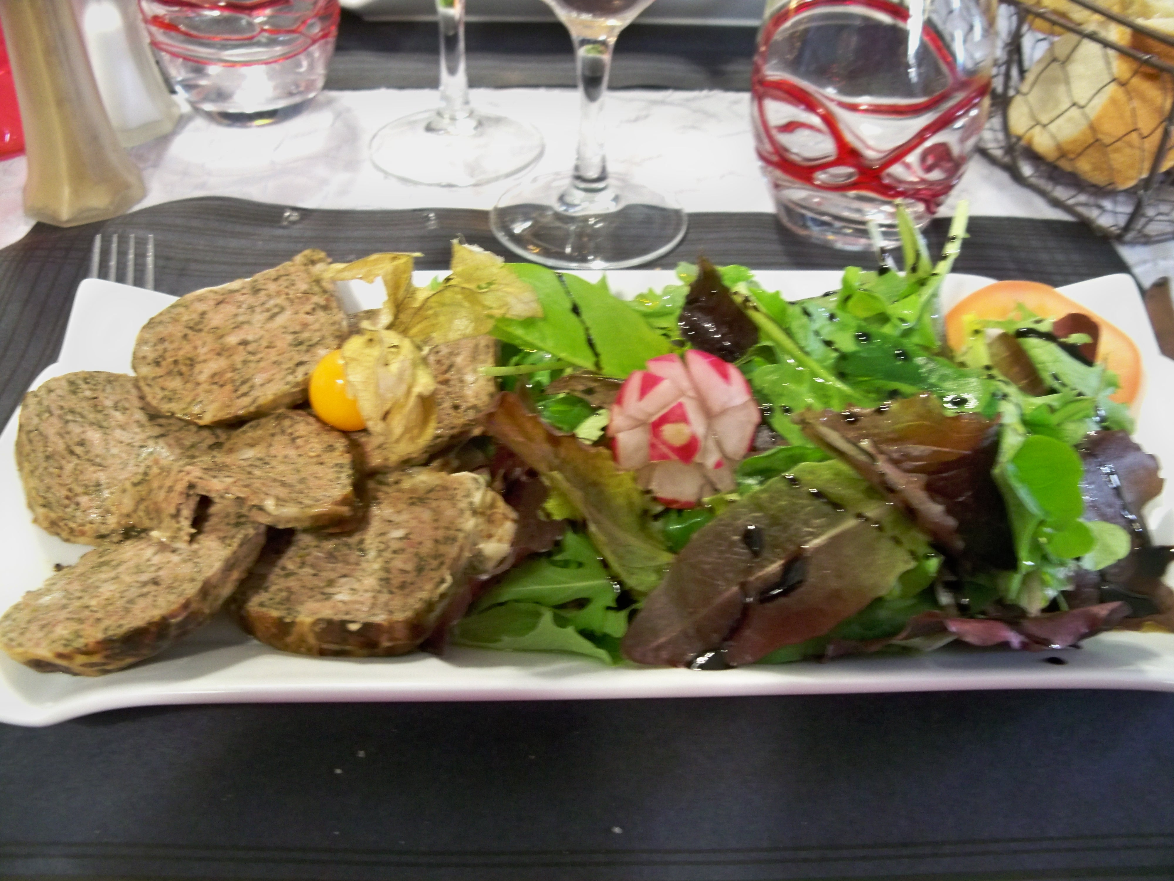 Cailette d'Ardèche et salade mesclun